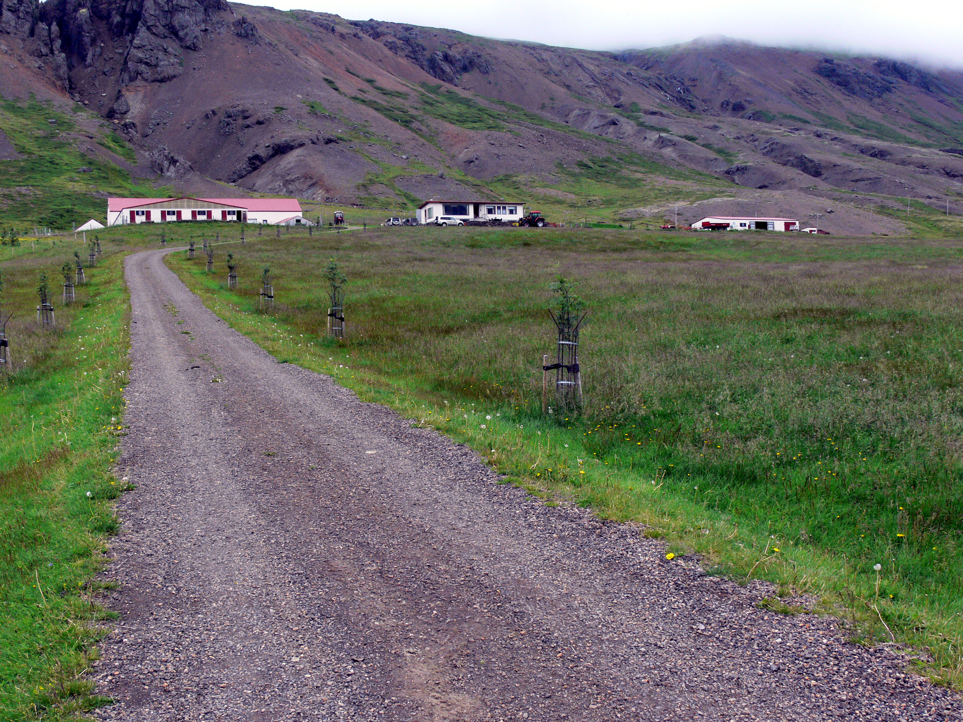 Þorgrimsstaðir, der innerste Hof in Suðurdalur in Ostisland.